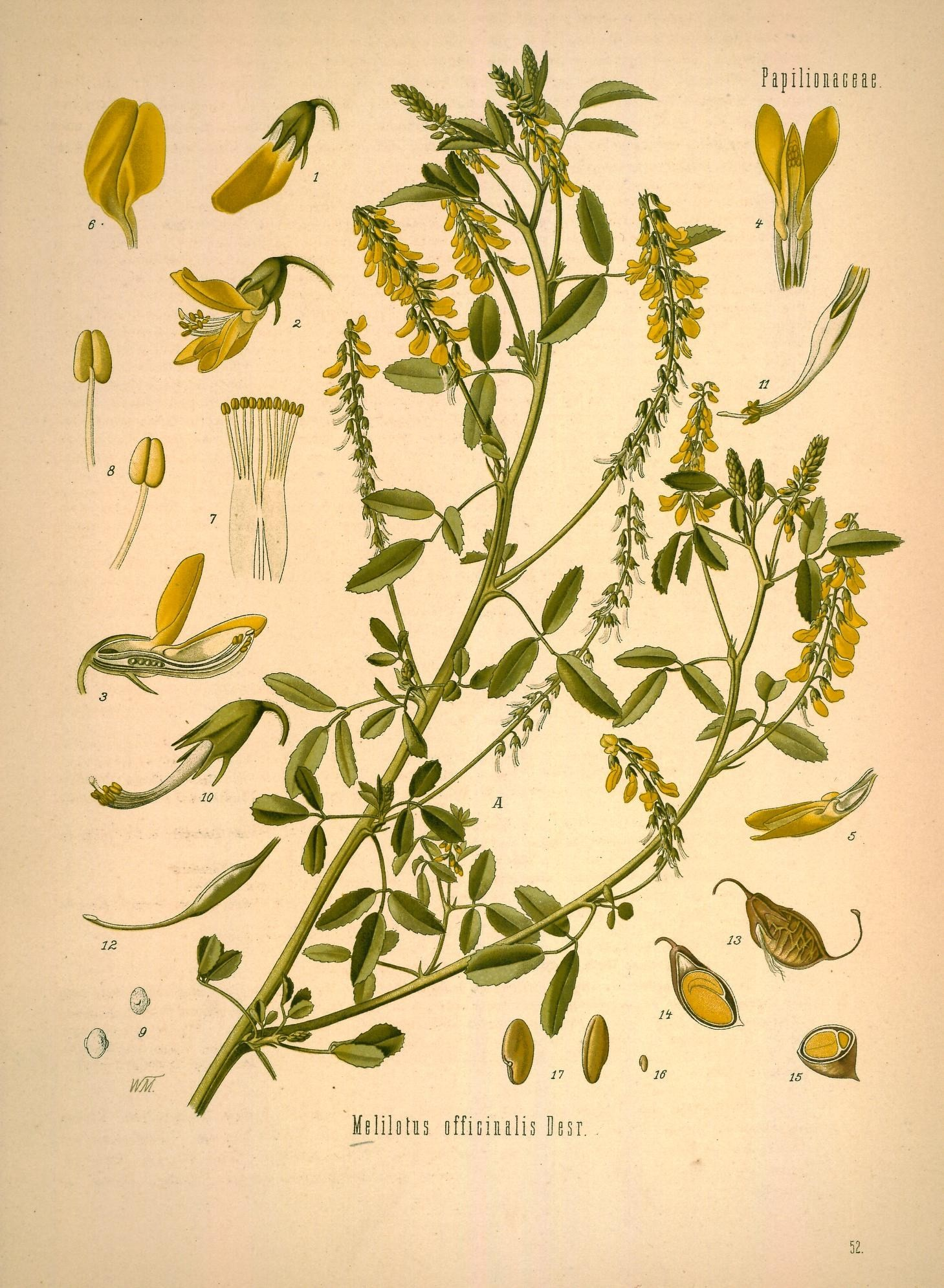 Gelber Steinklee. A blühende Pflanze von Mel. officinalis Desr. in natürl. Grösse; 1 unentfaltete Blüthe, vergrössert; 2 aufgeblühte Blüthe, desgl.; 3 dieselbe im Längsschnitt, desgl.; 4 Schiffchen mit Flügeln von vorn, desgl.; 5 dieselbe Figur von der Seite, desgl.; 6 Fahne, desgl.; 7 Staubgefässröhre, aufgeschnitten, desgl.; 8 einzelne Staubgefässe, desgl.; 9 Pollen unter Wasser, desgl.; 10 u. 11 Blüthe ohne Krone, mit und ohne Kelch, desgl.; 12 Stempel, desgl.; 13 Frucht, desgl.; 14 dieselbe im Längsschnitt, desgl.; 15 dieselbe im Querschnitt, desgl.; 16 u. 17 Same, natürl. Grösse und vergrössert, von verschiedenen Seiten.